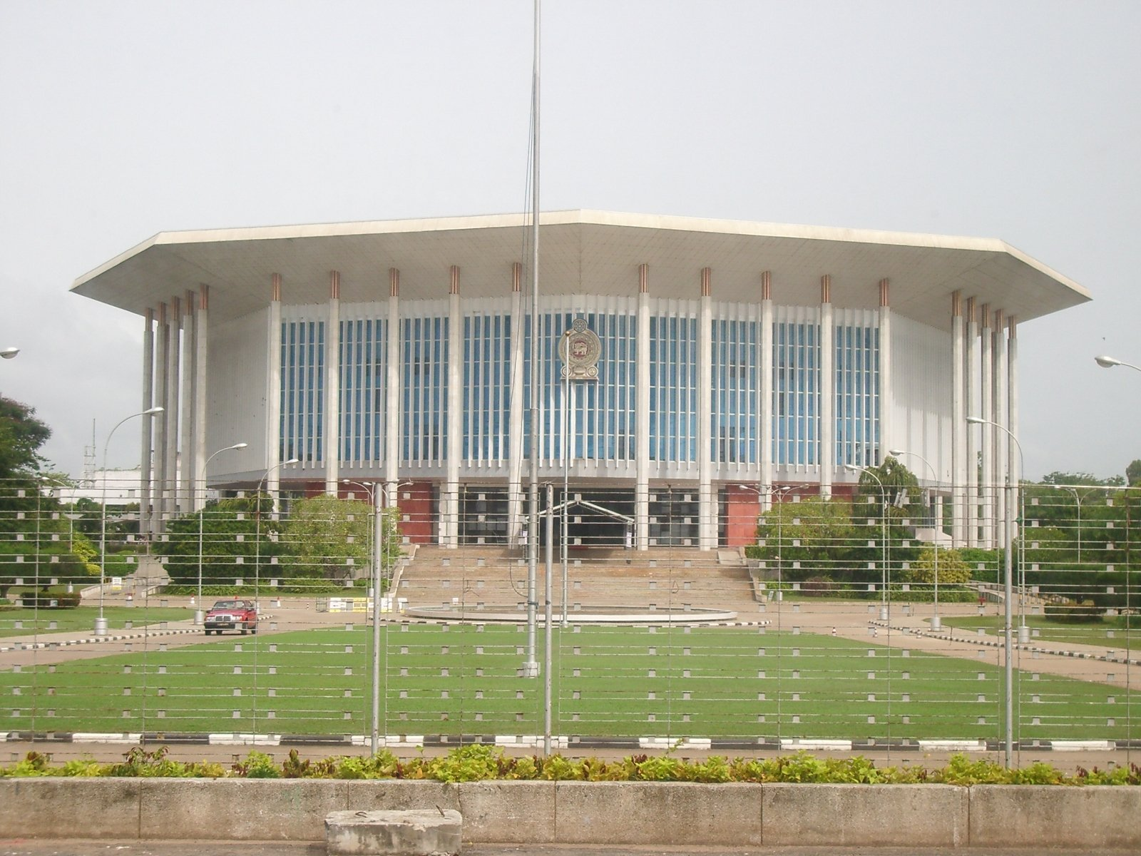 Edifici nou del parlament a Colombo, foto feta per J. Ollé el juliol del 2006